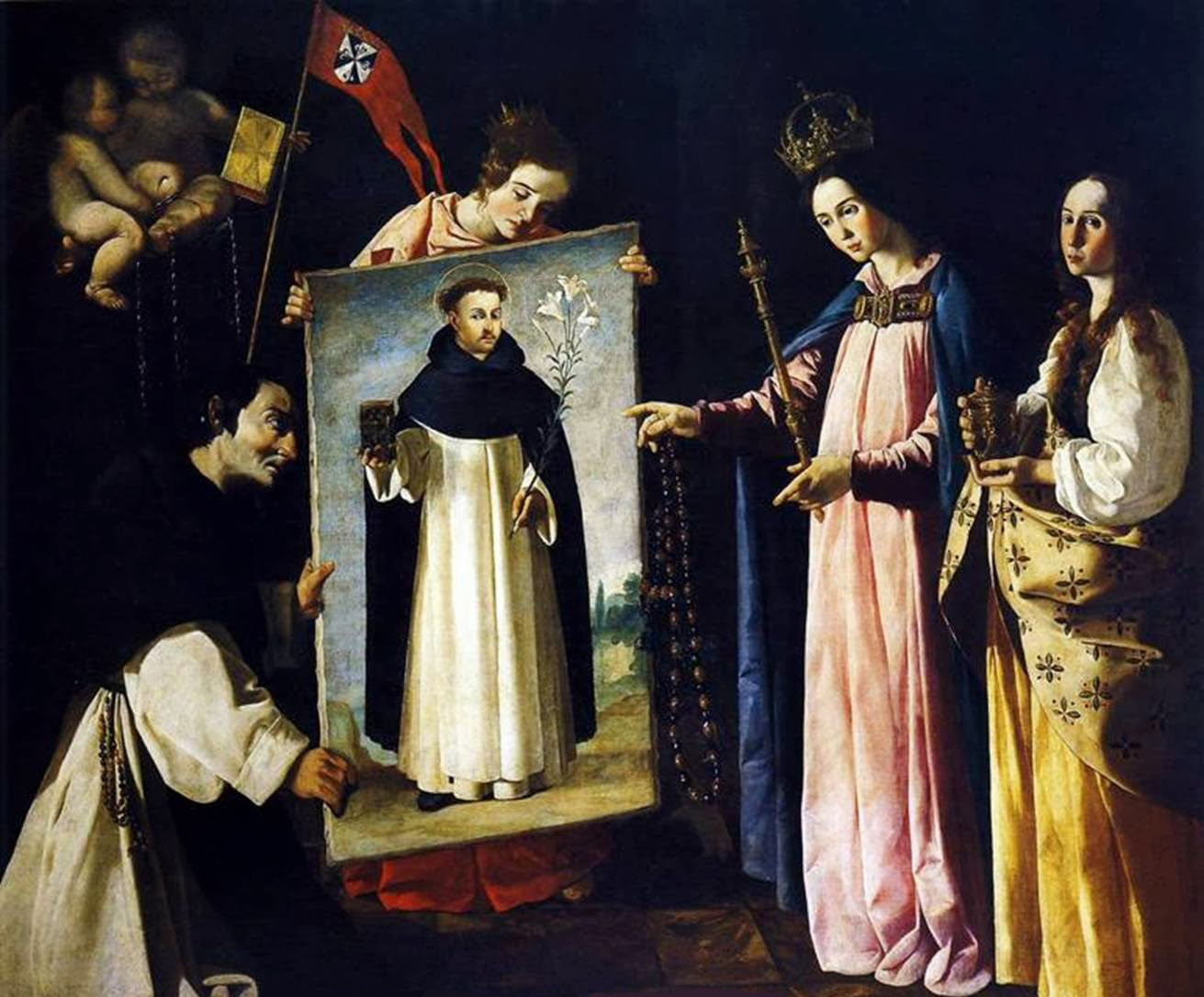 Santo Domingo en Soriano pintado por Zurbaran en 1626. Se encuentra en la Iglesia de Santa María Magdalena (Sevilla)